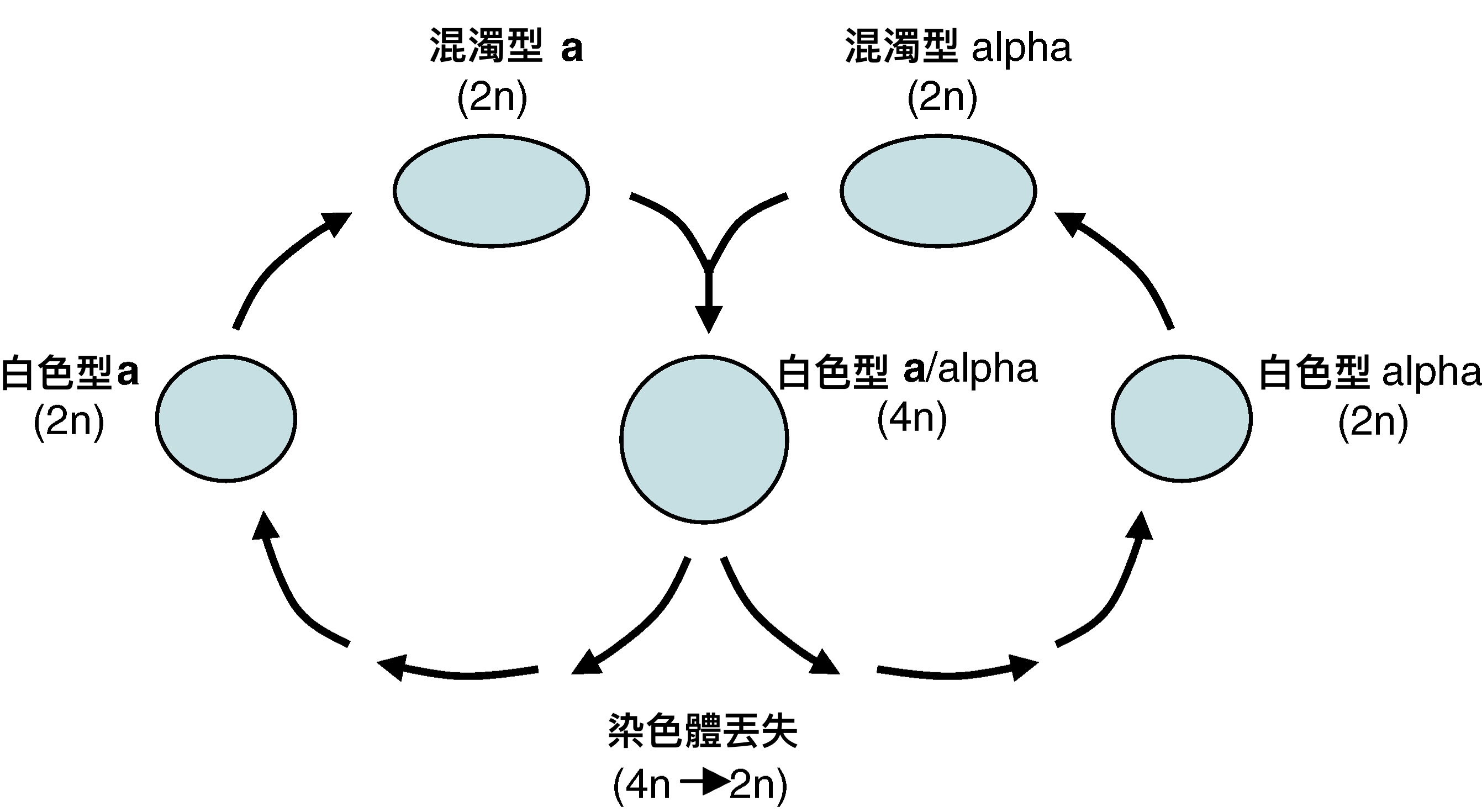 白色念珠菌的準性生殖過程